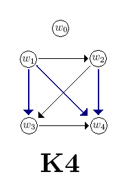 a K4 frame